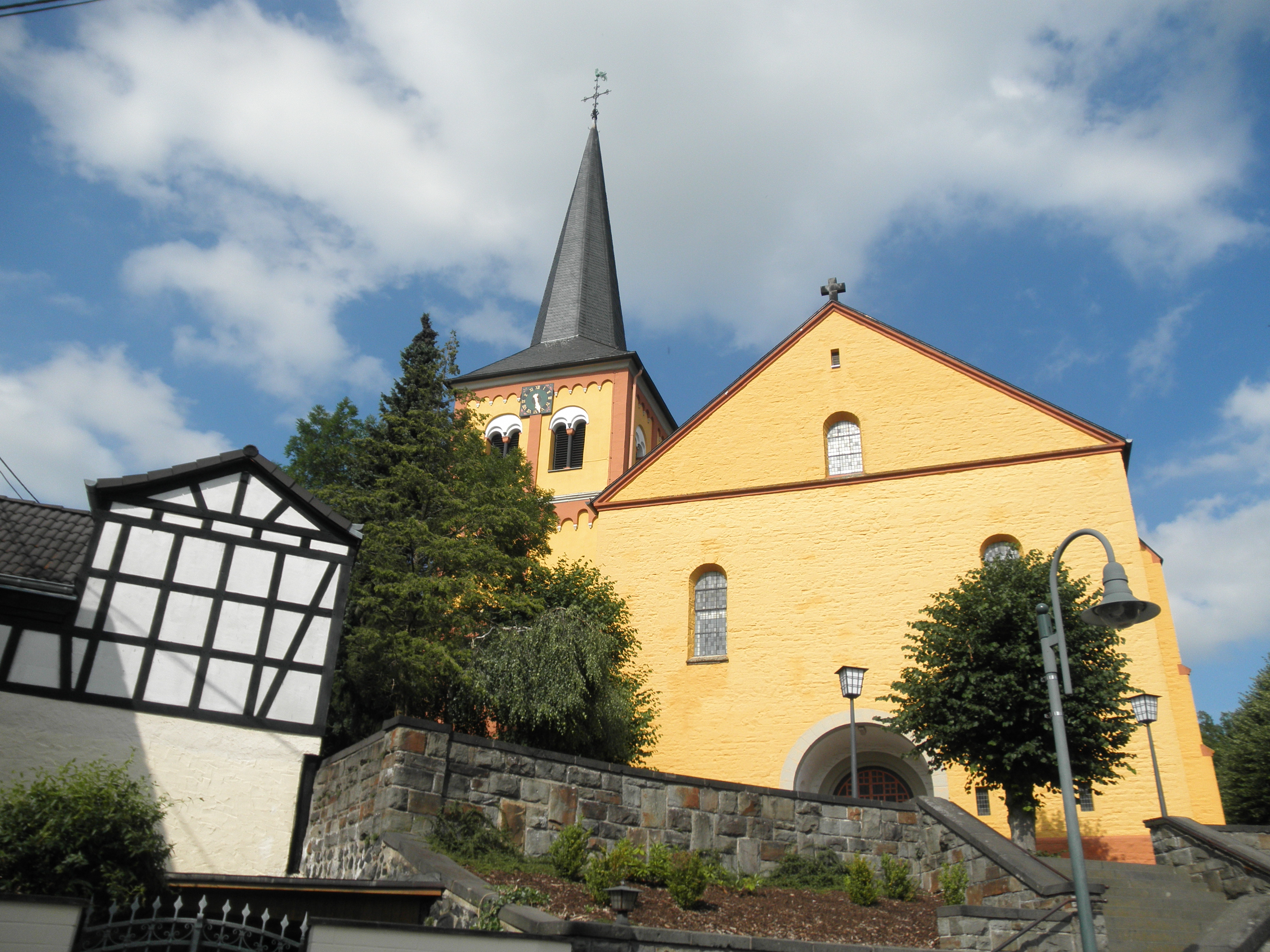 die katholische Kirche St. Laurentius in Asbach (Westerwald), DeutschlandEsperanto: la katolika preĝejo St. Laurentius en Asbach (Westerwald), Germanio